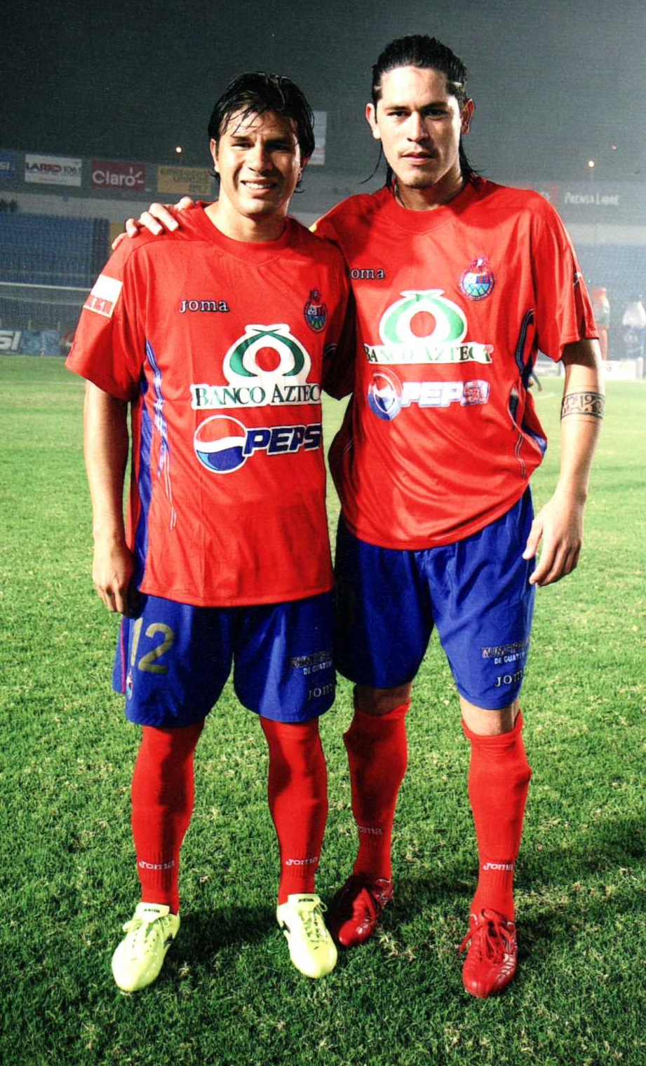 Paulo Centurión junto a Carlos González, ambos del C.S.D. Municipal posando previo al encuentro a disputarse contra el clasico rival Comunicaciones FC